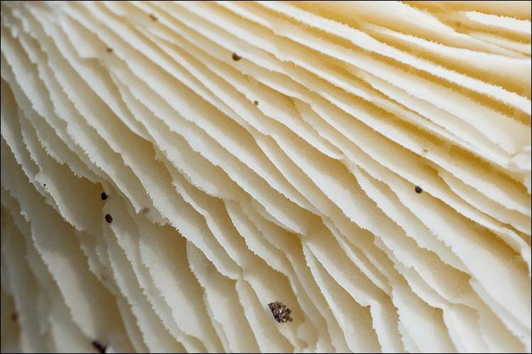 Lentinus tigrinus (Bull.) Fr.